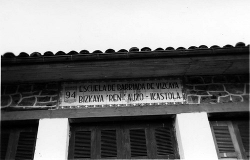 Amaitermingo (Bizkaia) auzo ikastola, Bizkaiko Foru Aldundiak (Estatuak betetzen ez zituen beharrizanak betetzearren) 1920-1932. urteen bitartean sortutako euskarazko 125 auzo eskoletako bat.